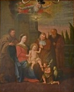 Altarbild der Kapelle Altenrode (Schladen-Werla), Aufnahme 2013: Heilige Sippe, links Josef und Maria mit dem Jesuskind, rechts Elisabeth und Zacharias und Johannes der Täufer als Knabe mit dem Gotteslamm